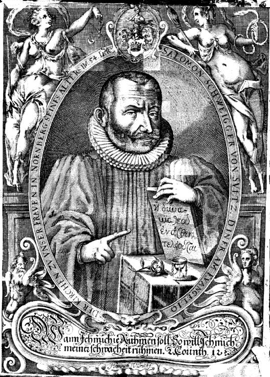 Selbstbildnis von Salomon Schweigger 1605 im Alter von 54 Jahren. Oben mittig das Wappen der Familie Schweigger